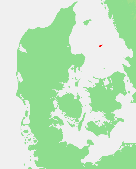 DK - Anholt.PNG